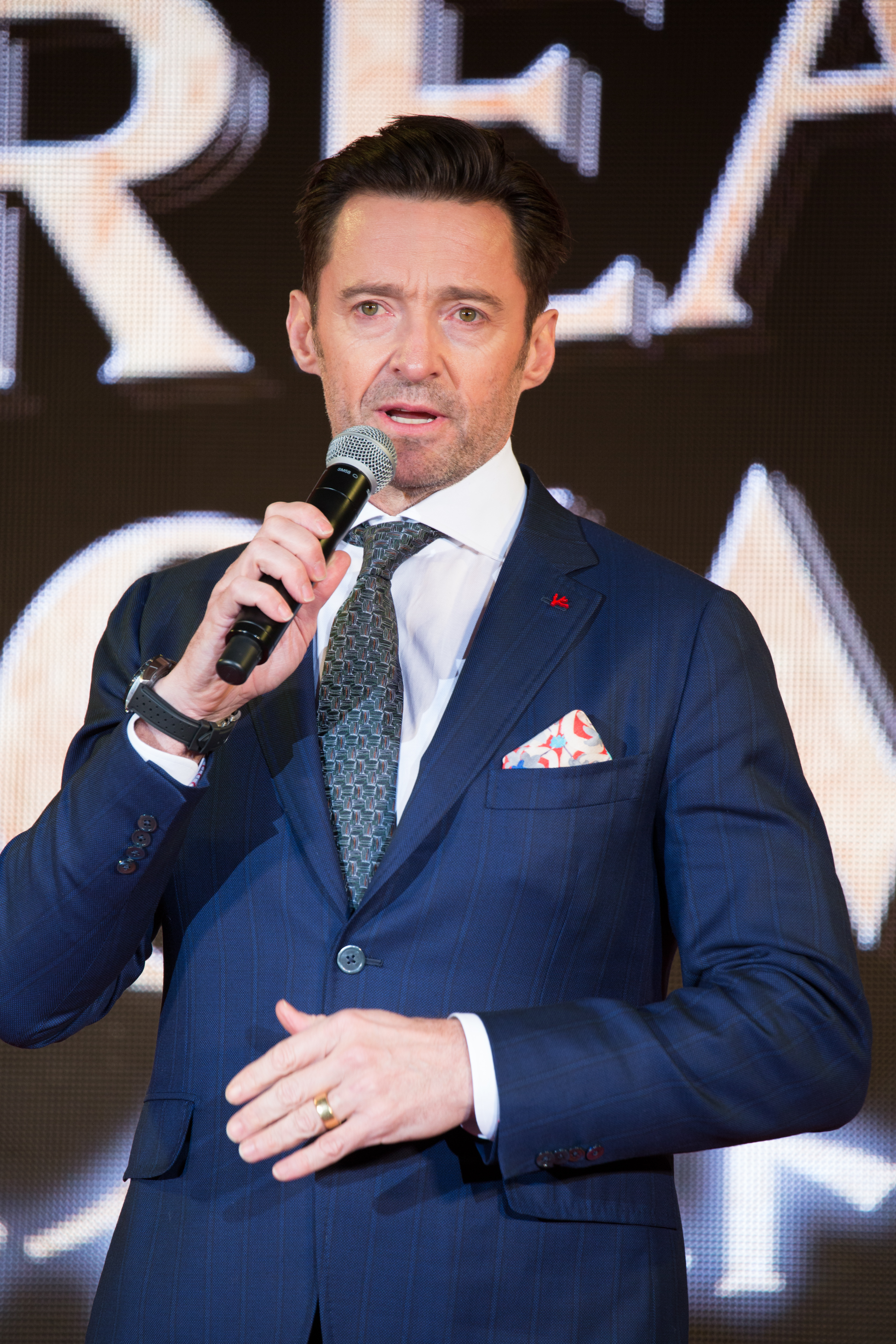 グレイテスト・ショーマン ジャパン・プレミア レッドカーペット ヒュー・ジャックマン